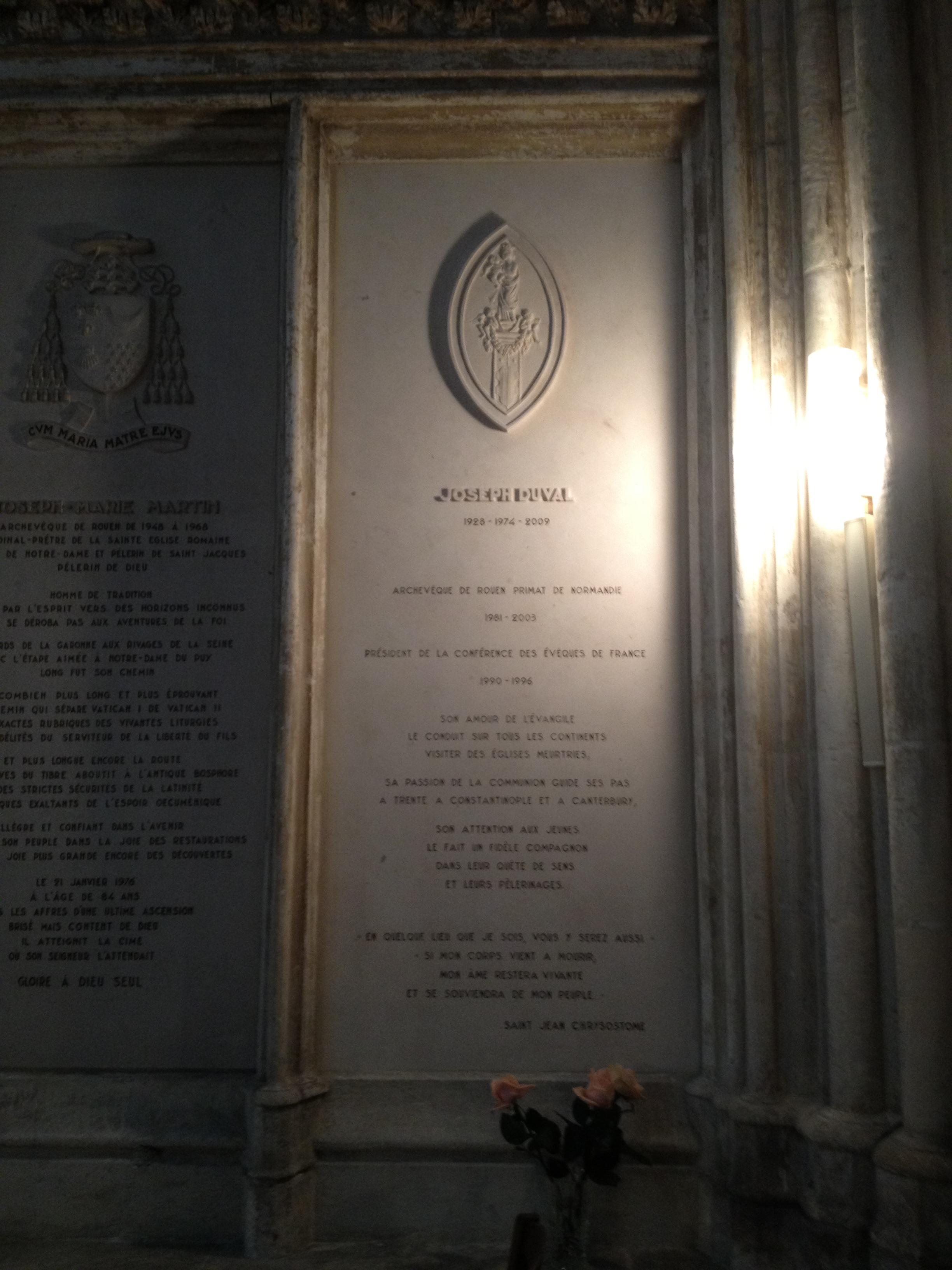 Plaque commémorative de Joseph Duval.